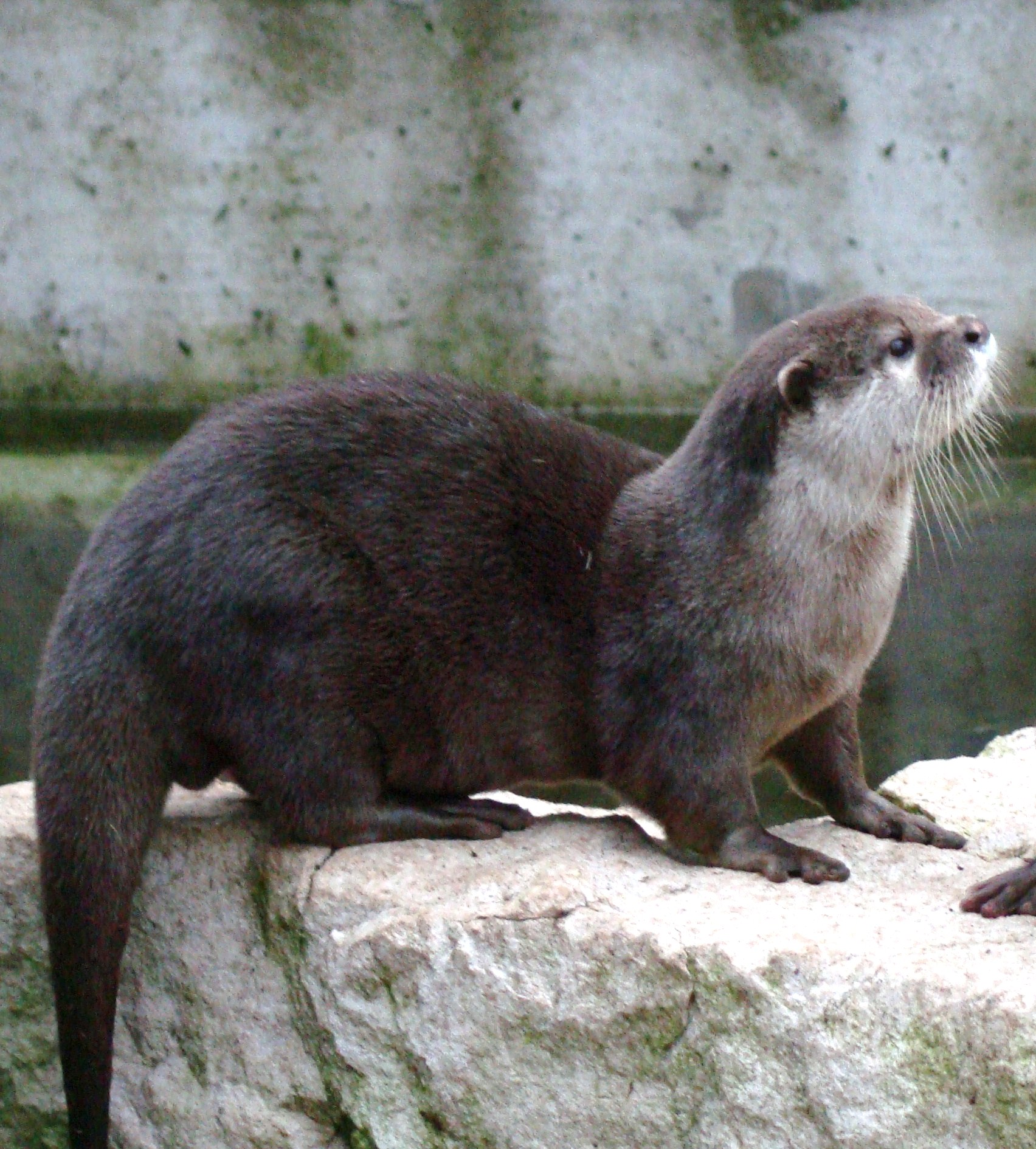 Petite loutre cendrée (Aonyx cinerea), La-Chaux-de-Fonds, Suisse